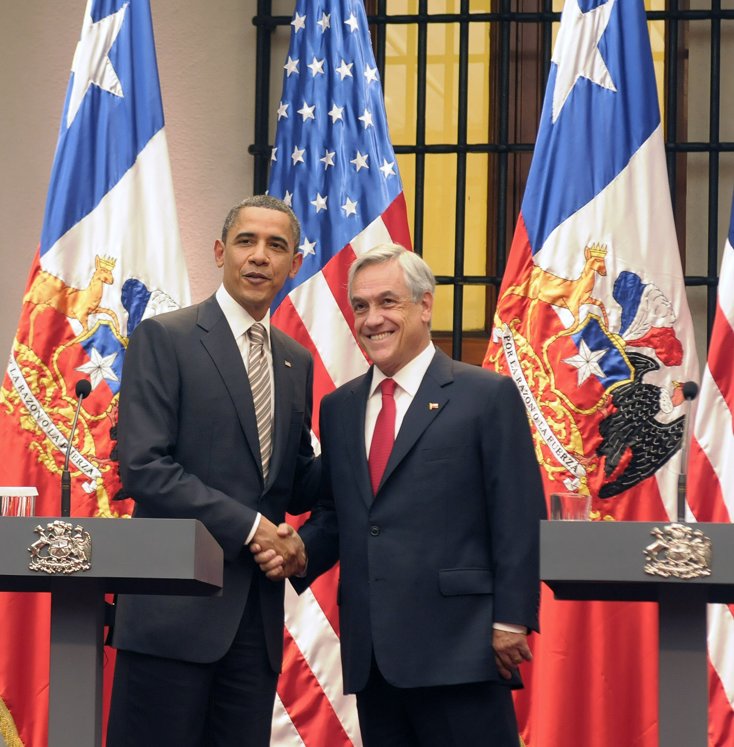 Declaración conjunta